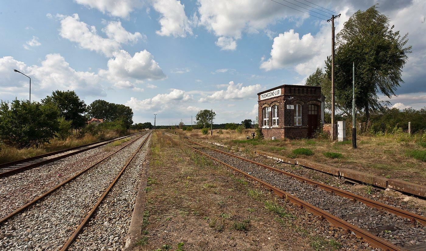 Na stacji, a zgodnie z nomenklaturą - przystanku kolejowym w Trzemesznie Lubuskim, niewiele zostało - jakieś zabite dechami budynki pomocnicze. Budynek dworca rozebrany. Została tylko część dla dyżurnego ruchu z balkonem na dachu.